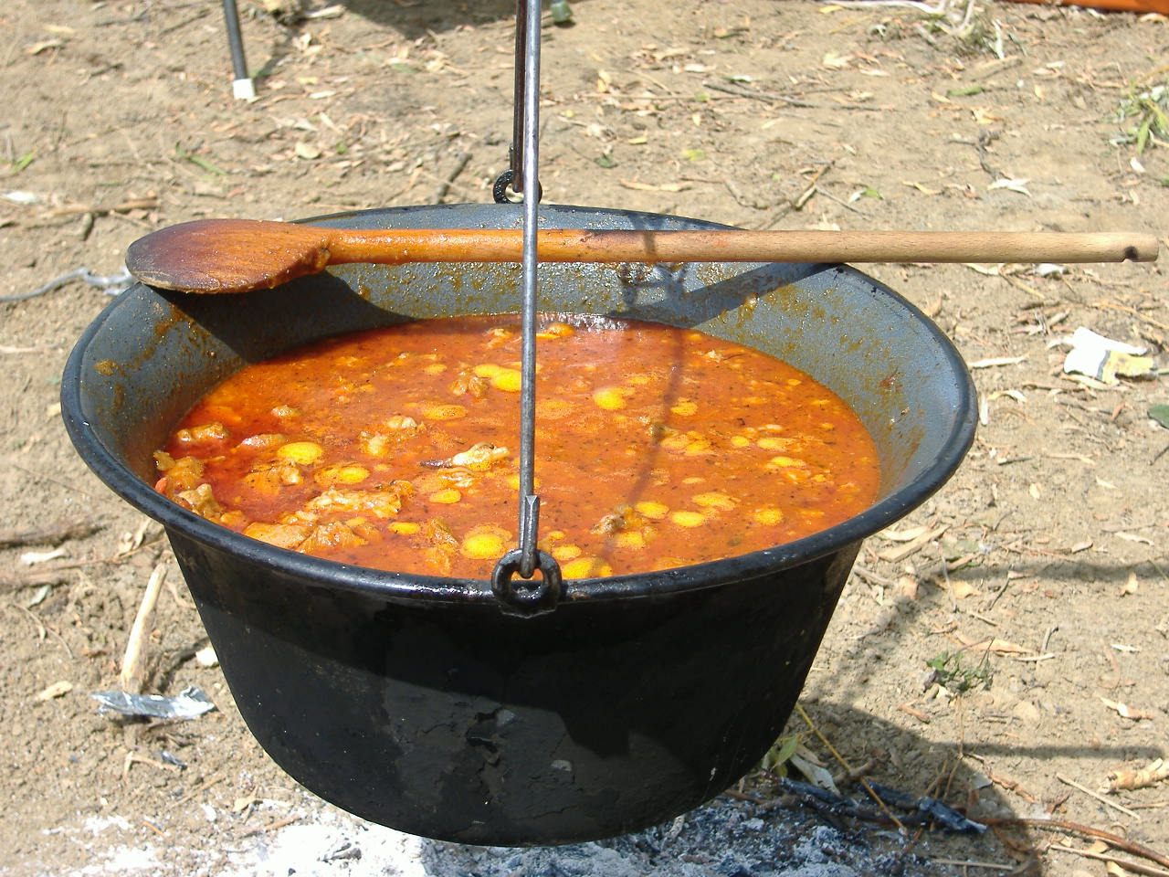 Gulyás, készült a fegyverneki gulyásfesztiválon